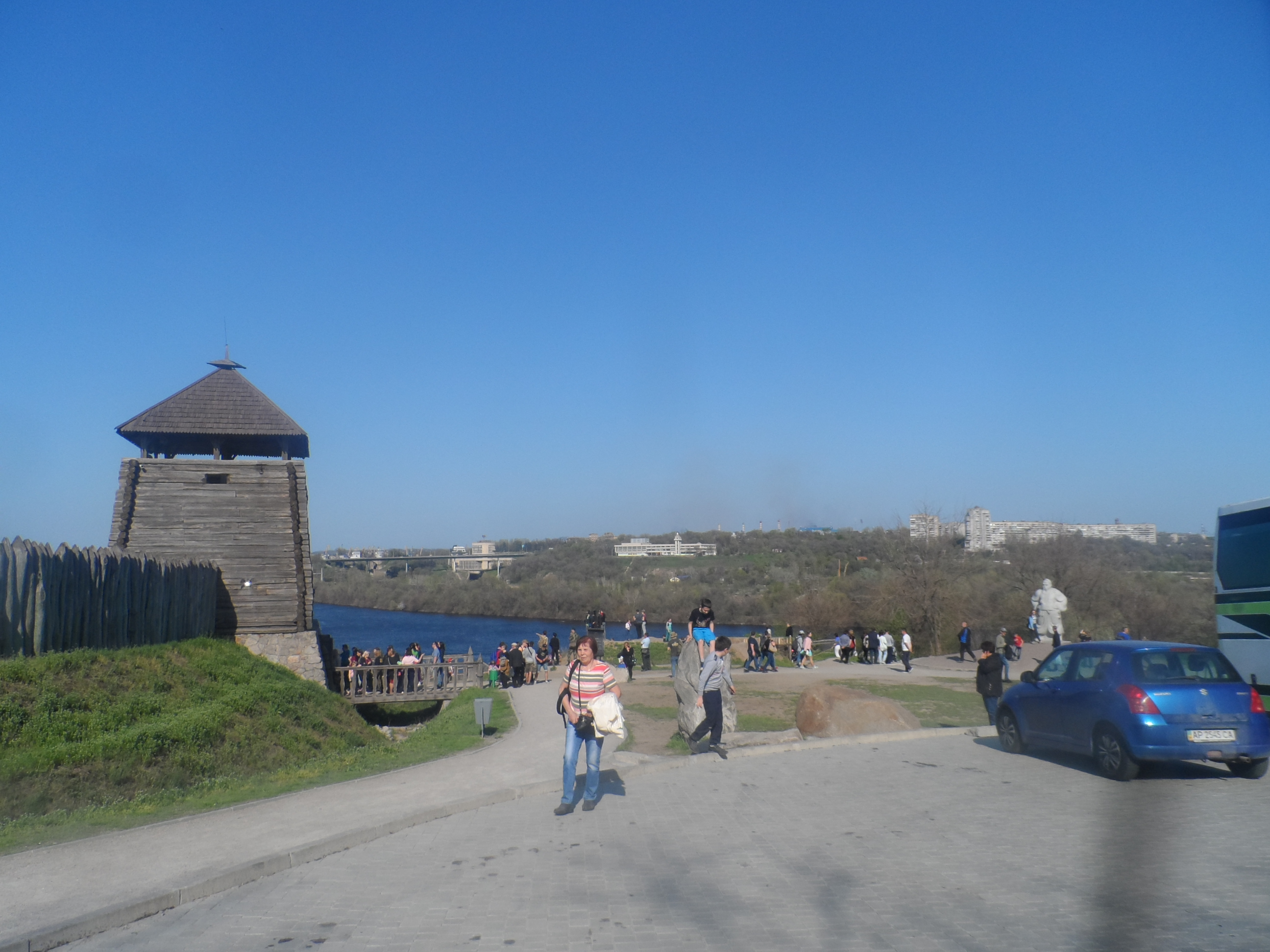 Запорожье